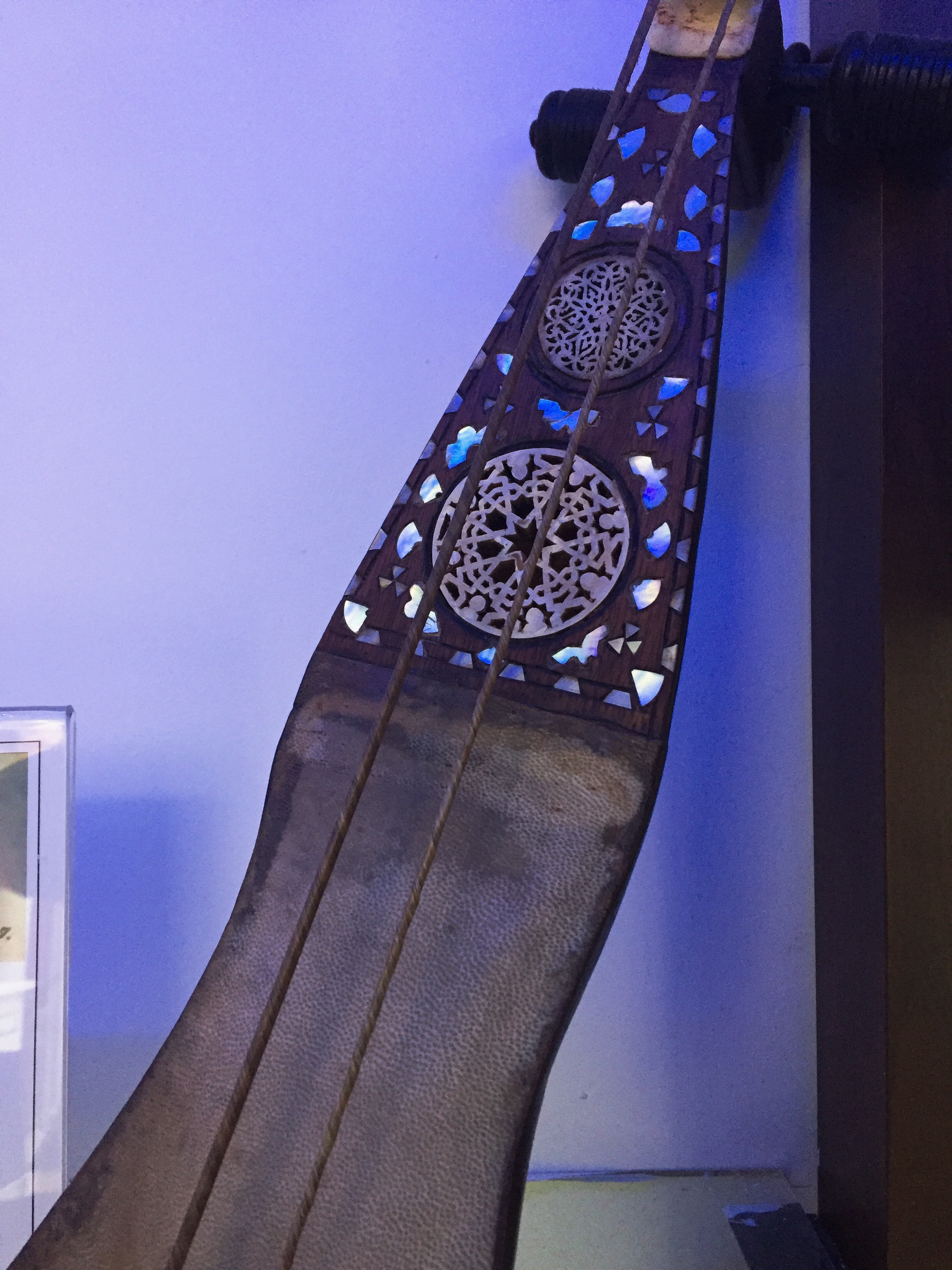 ربابة معرضة في دار الآلة بمدينة الدار البيضاء المغربية